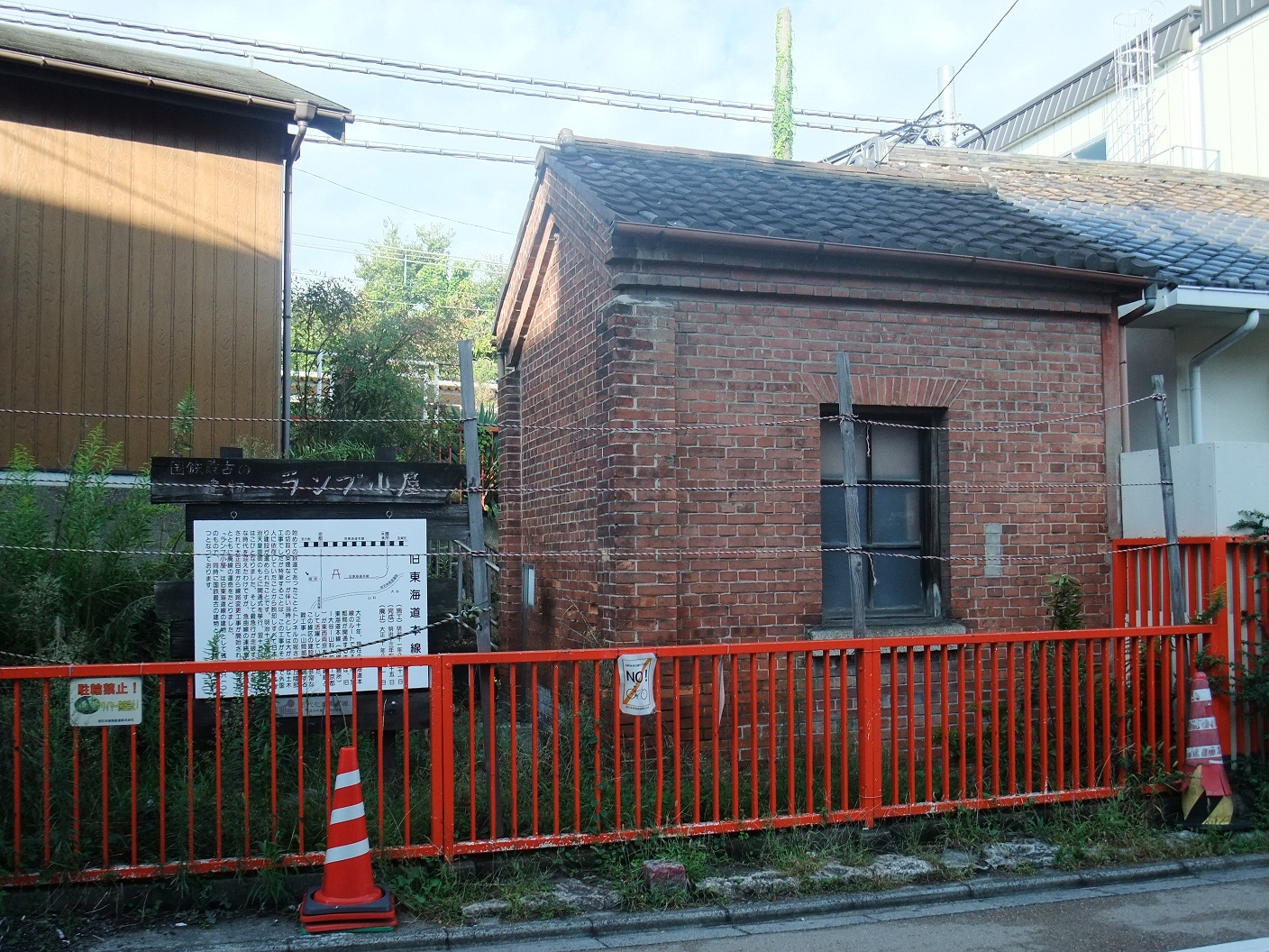 奈良線稲荷駅ランプ小屋